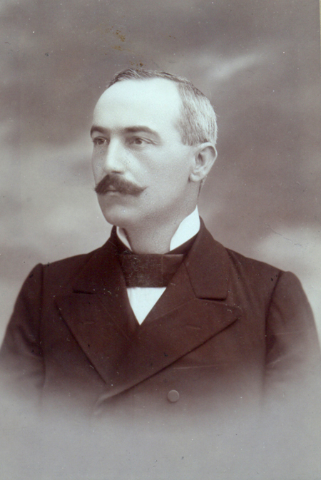 Spáda János (1877-1913) építész